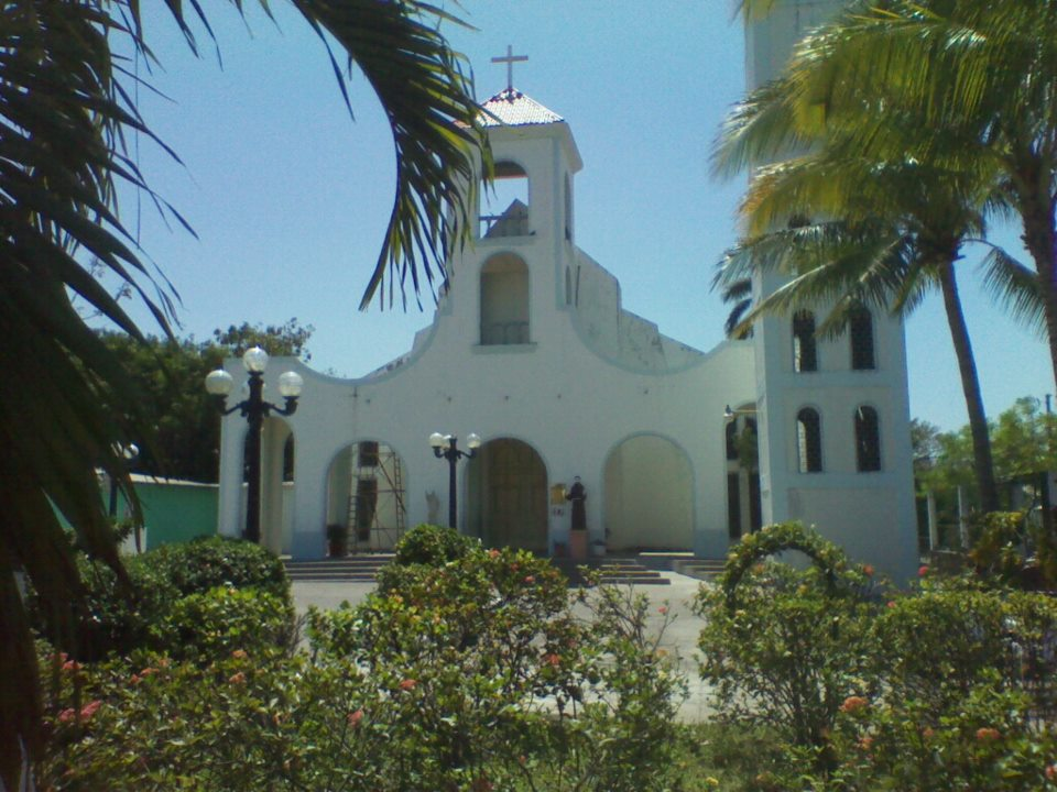 Catolico